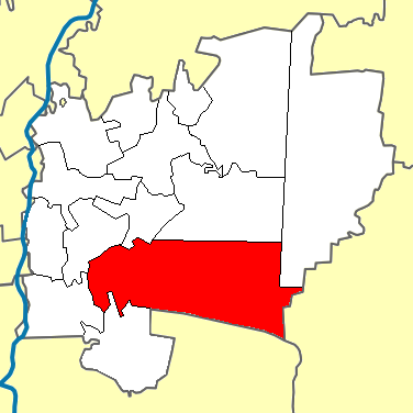 Ітуловська сільська рада